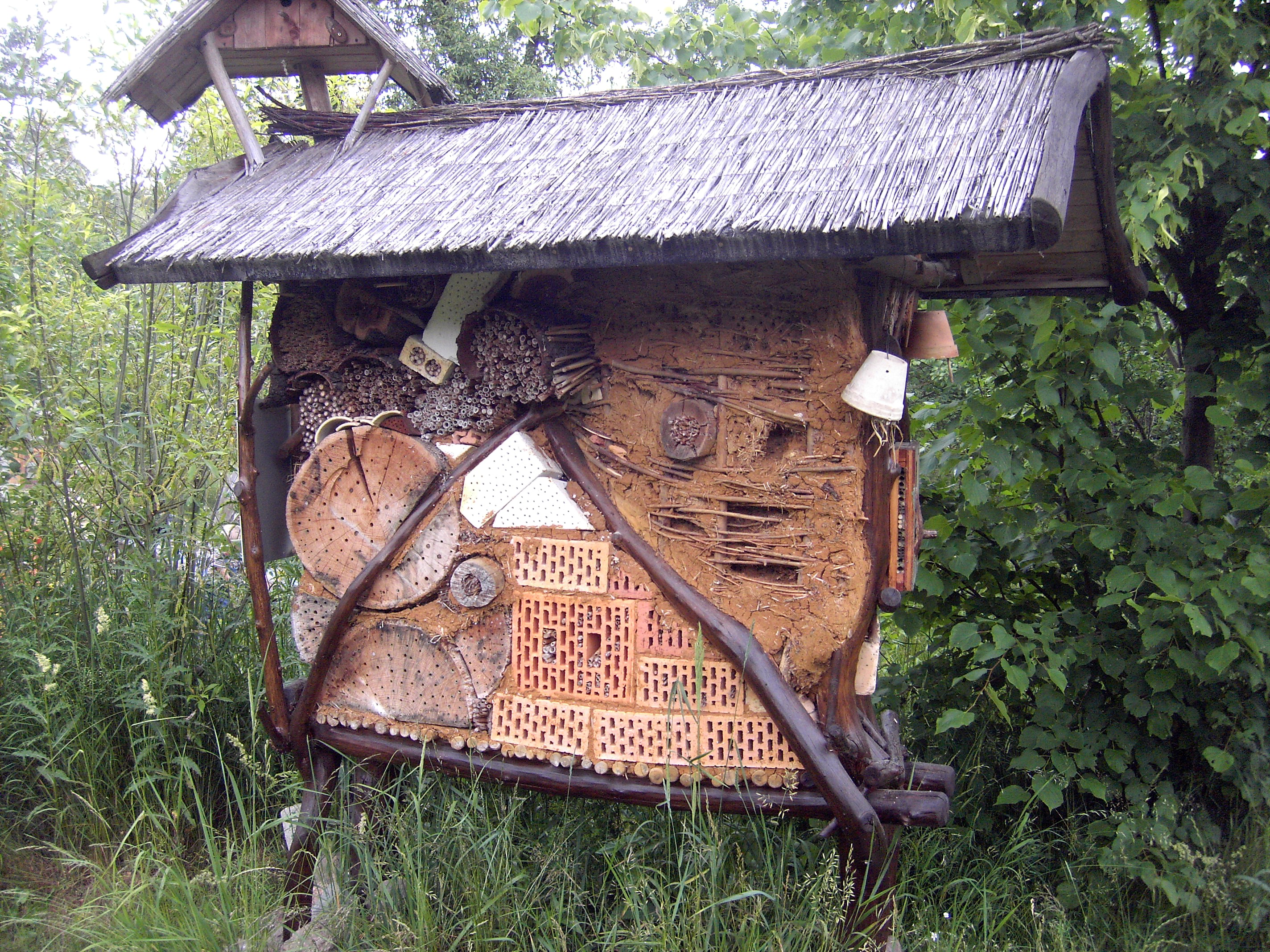 Insektenhotel im Informationszentrum des Biosphärenreservates Mittelelbe